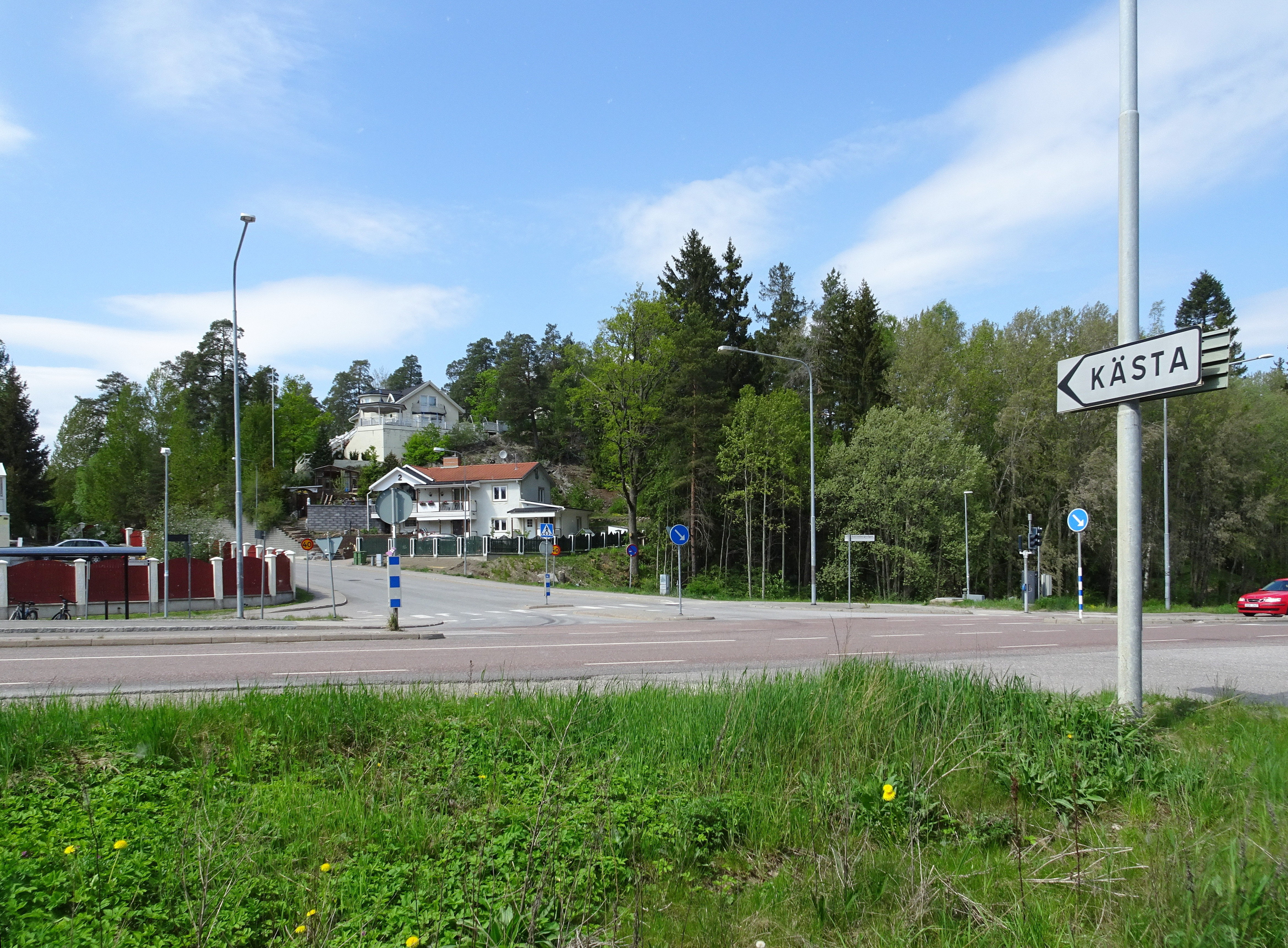 Kästa, infartsskylt vid Katrinebergsvägen